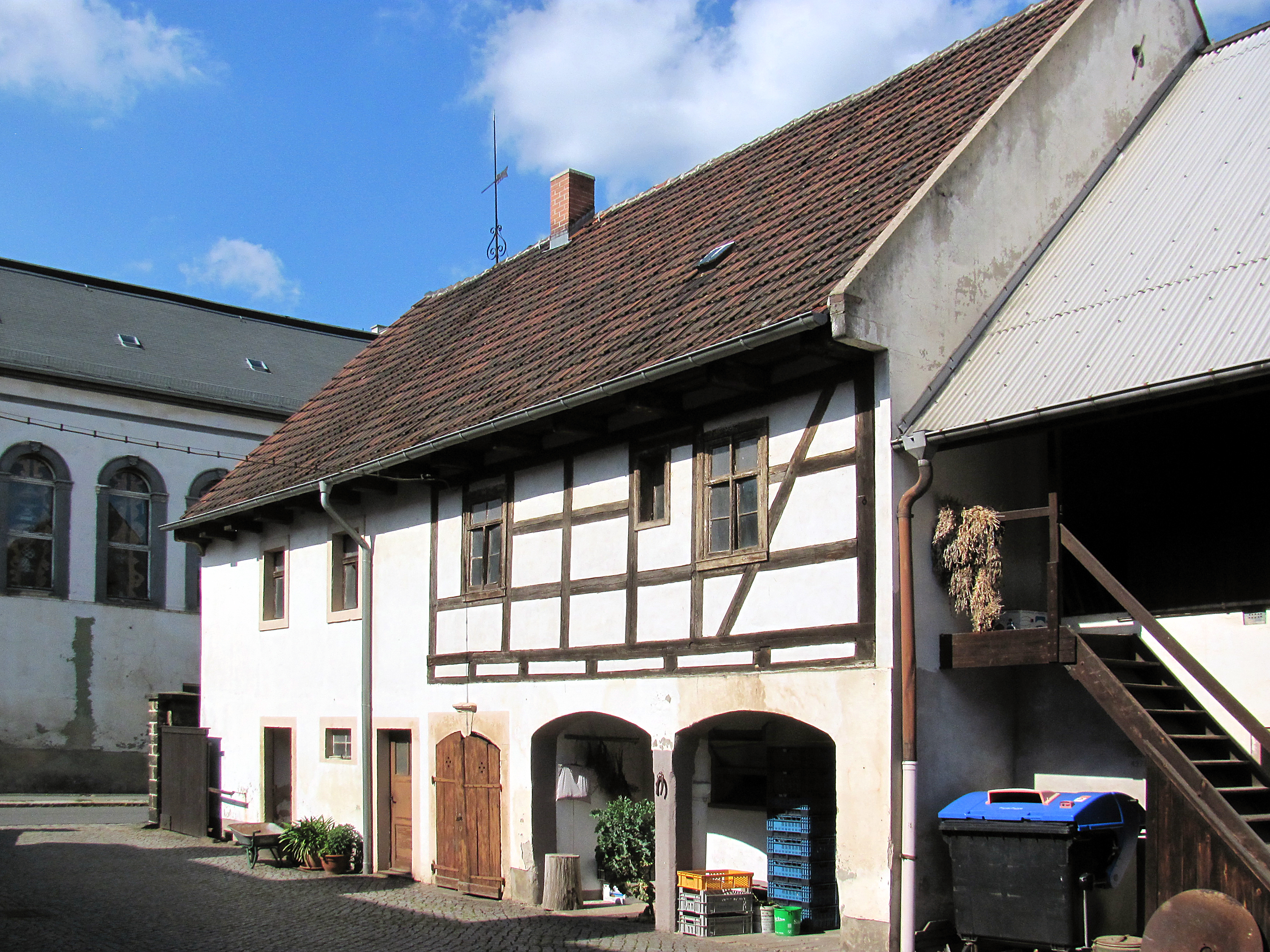 Serkowitz, Dreiseithof Altserkowitz 1 (Serkowitz), nördliches Seitengebäude mit Kumthalle